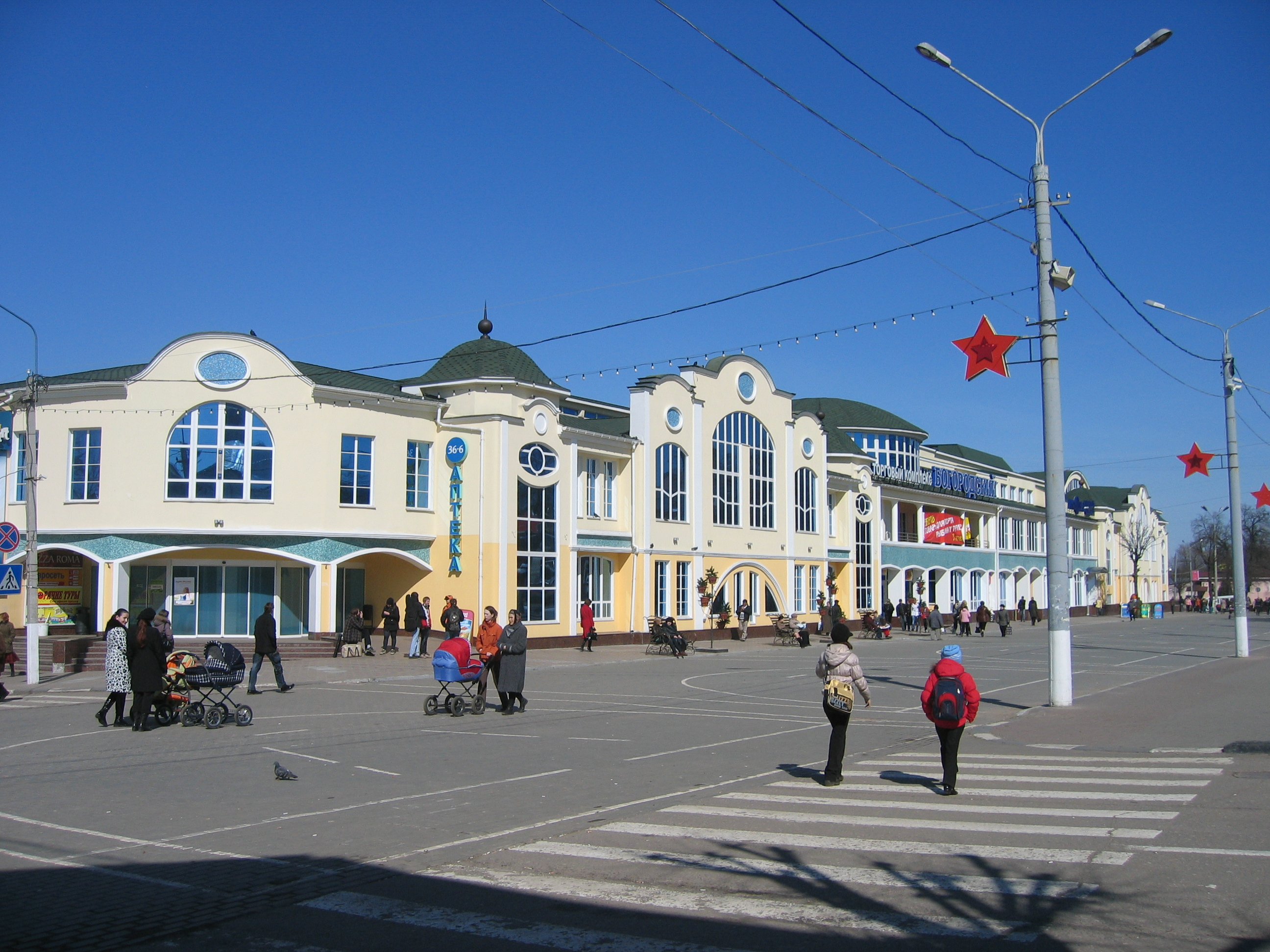 Пешеходная зона в Ногинске - угол улиц Соборной и Третьего Интернационала.